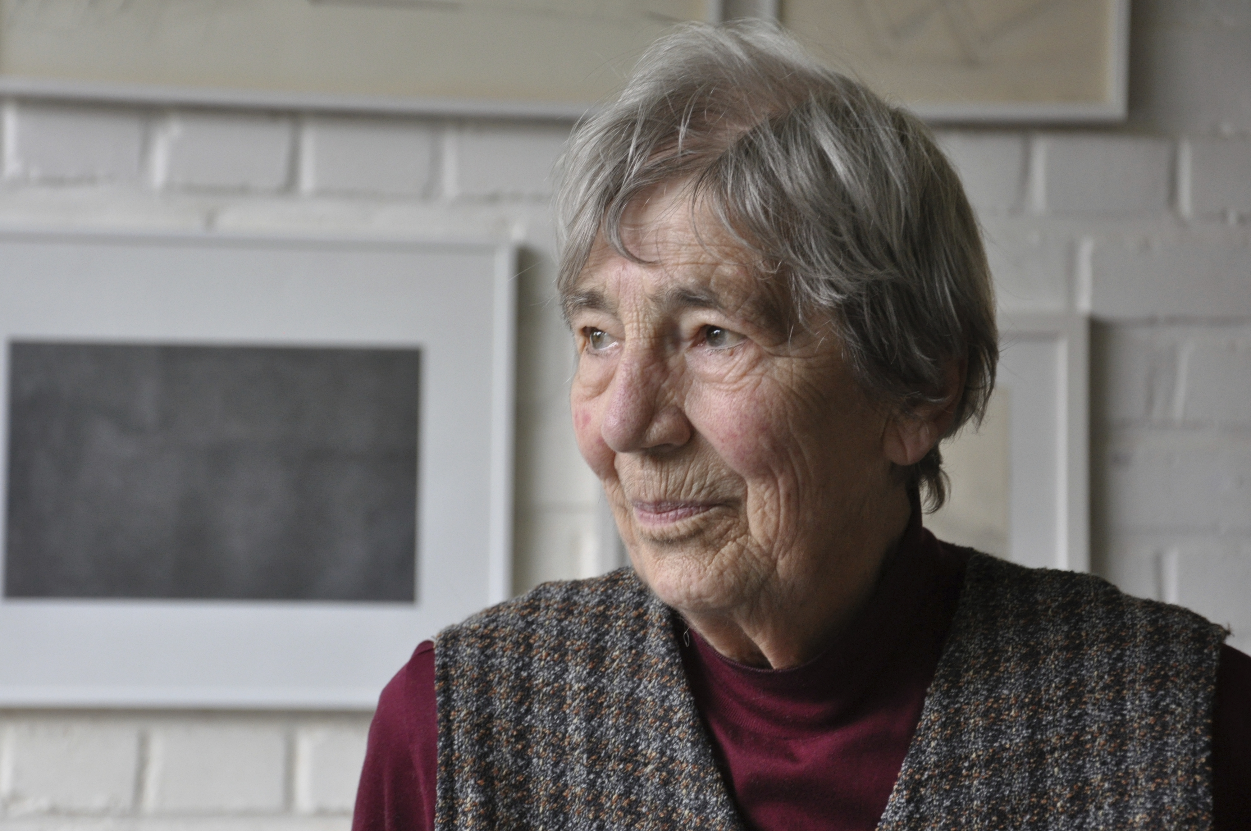 German Artist Beate Kuhn